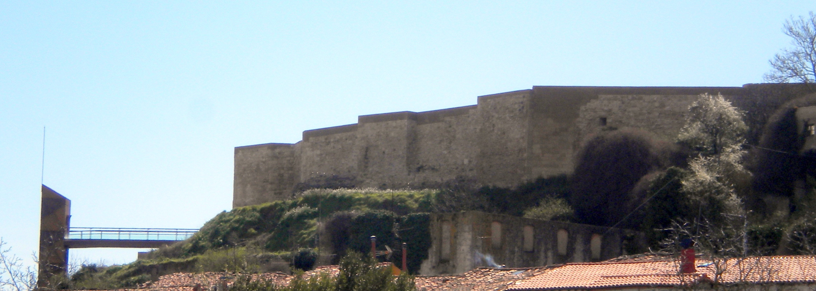 Vista desde el Norte del Castillo de Miranda de Ebro (Castilla y León, España)